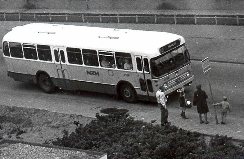 Bus 90, NZH, 1972 Halte Zwarteweg/Fagelstraat, toenmalige grens Katwijk-Noordwijk.